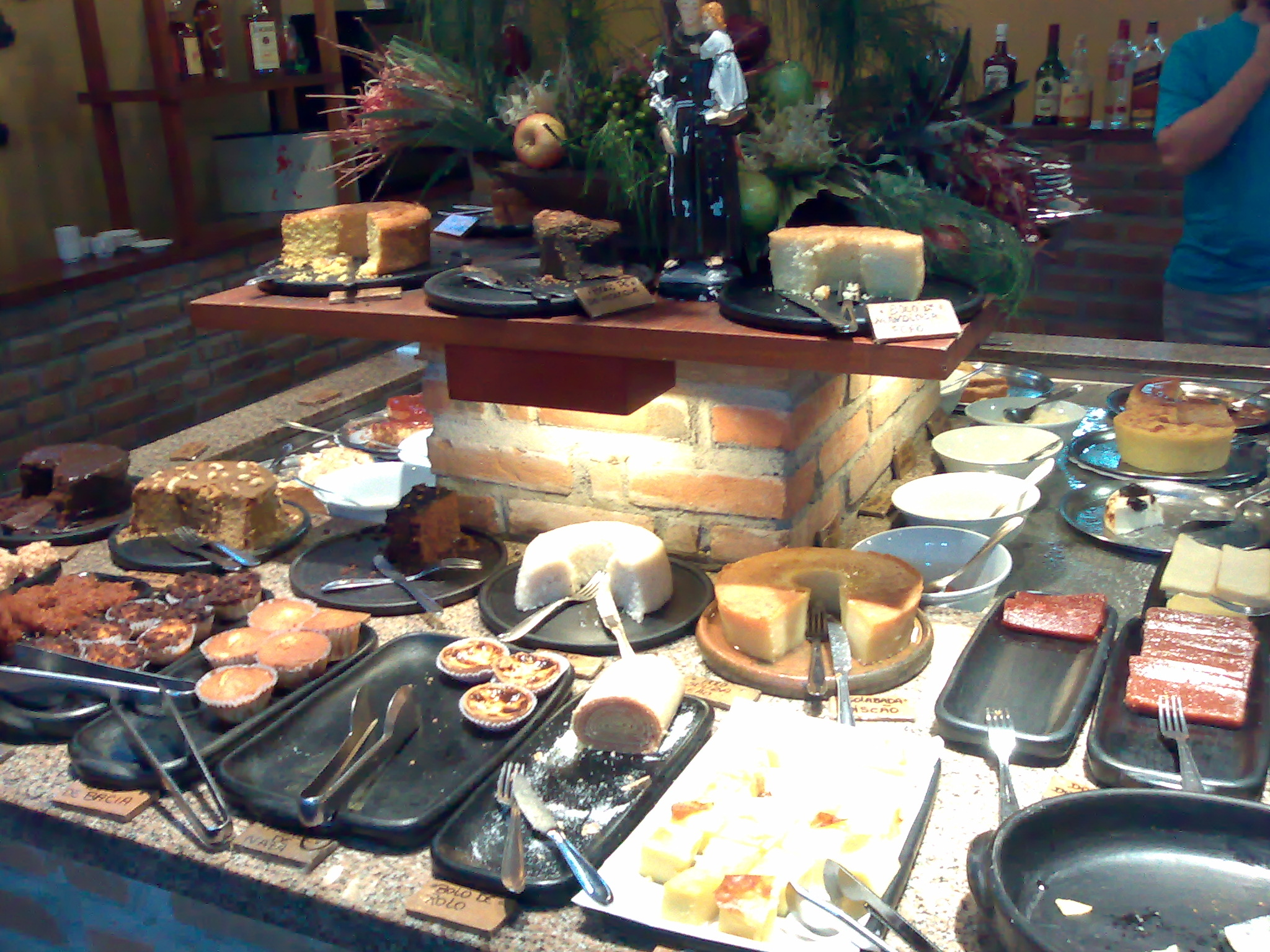 Restaurante de comida regional - Recife, Pernambuco, Brasil.